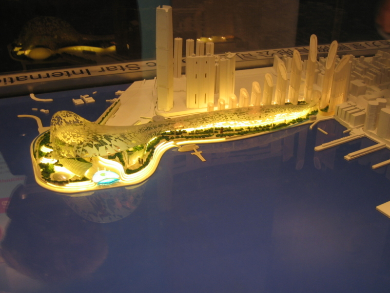 WKCD DYNAMIC STAR INTERNATIONAL LIMITED Plan